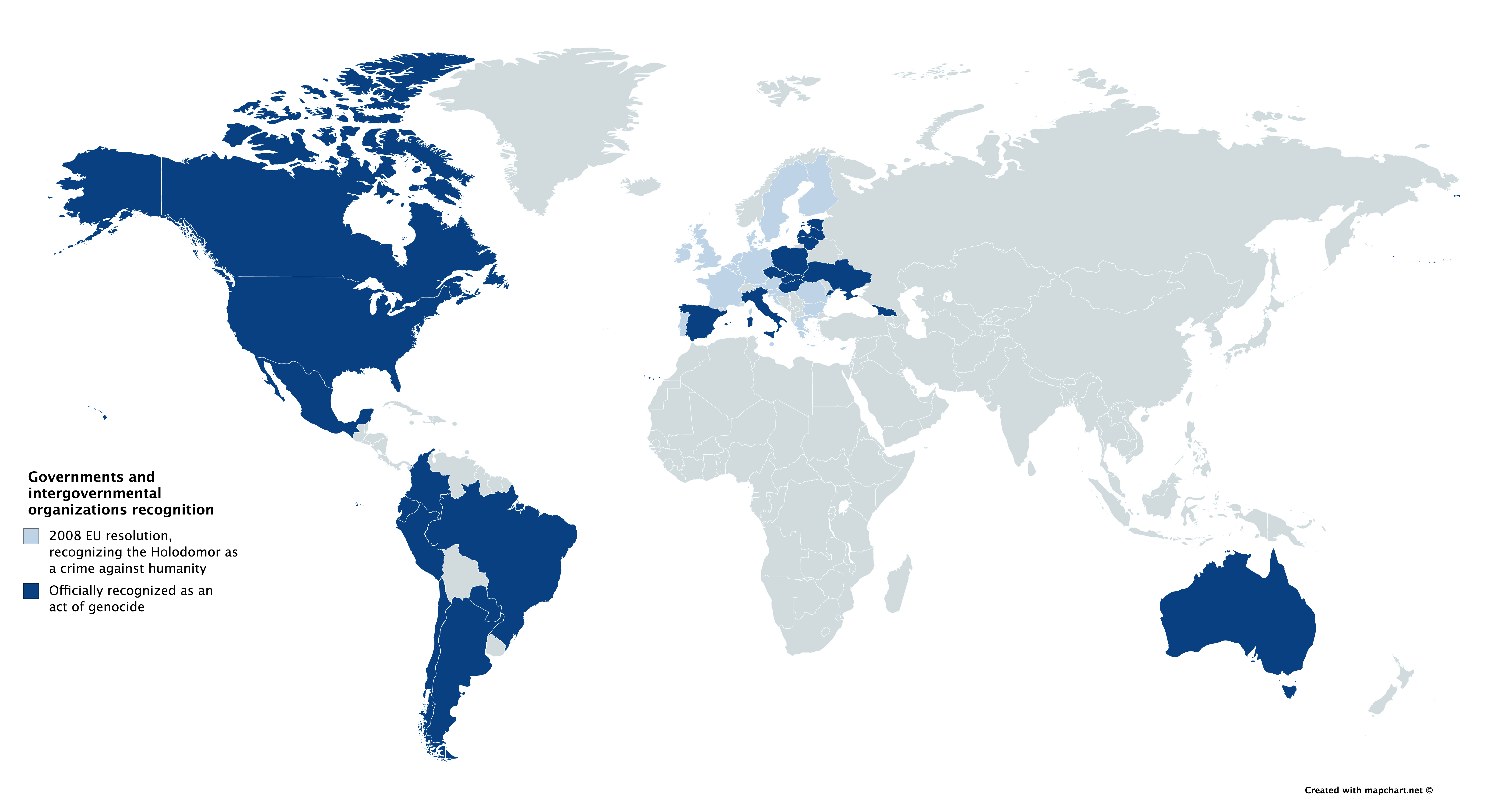 Карта на страните и международни организации, признаващи Гладомора за геноцид.